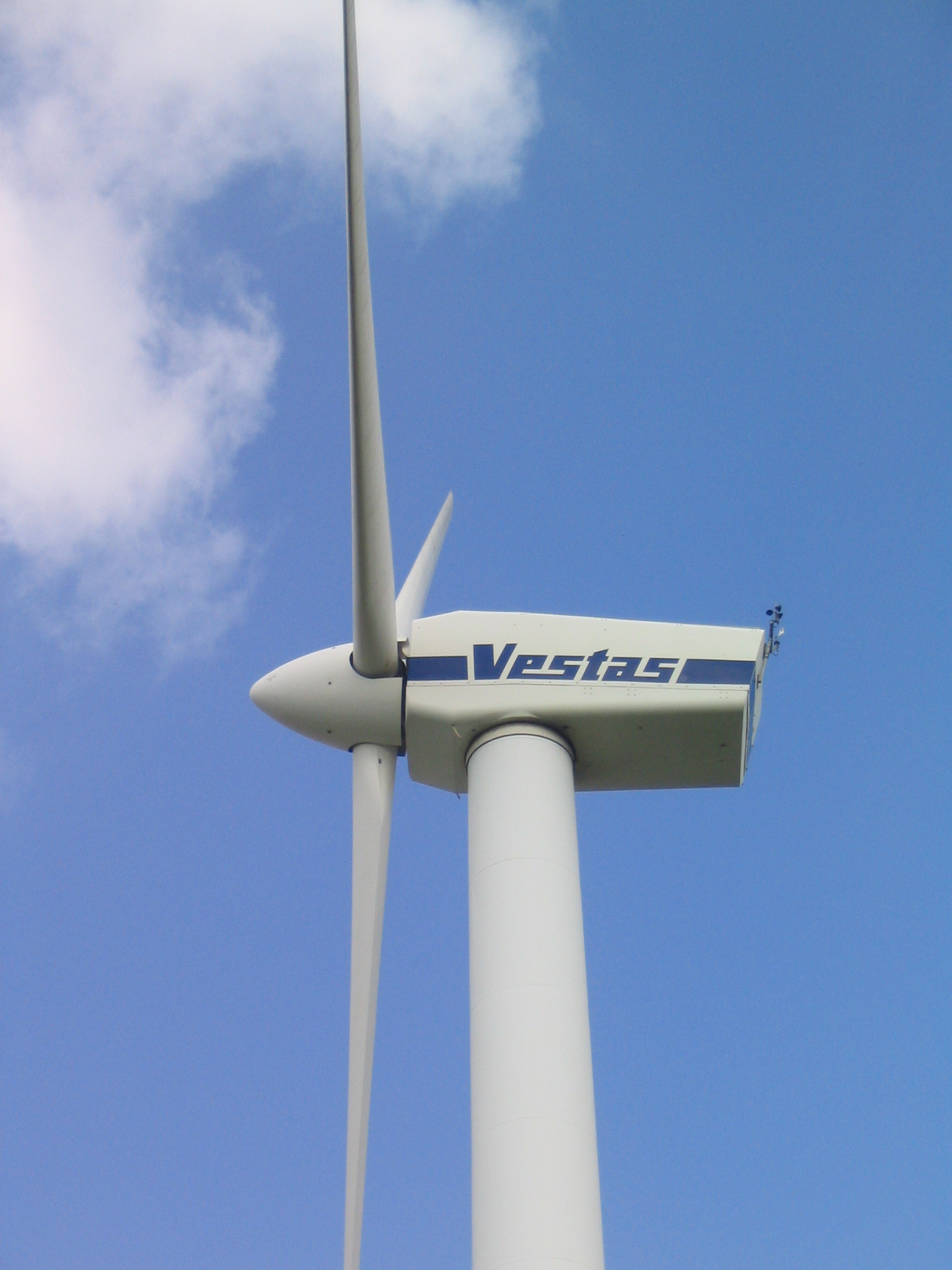 Vestas wind turbine, Dithmarschen.